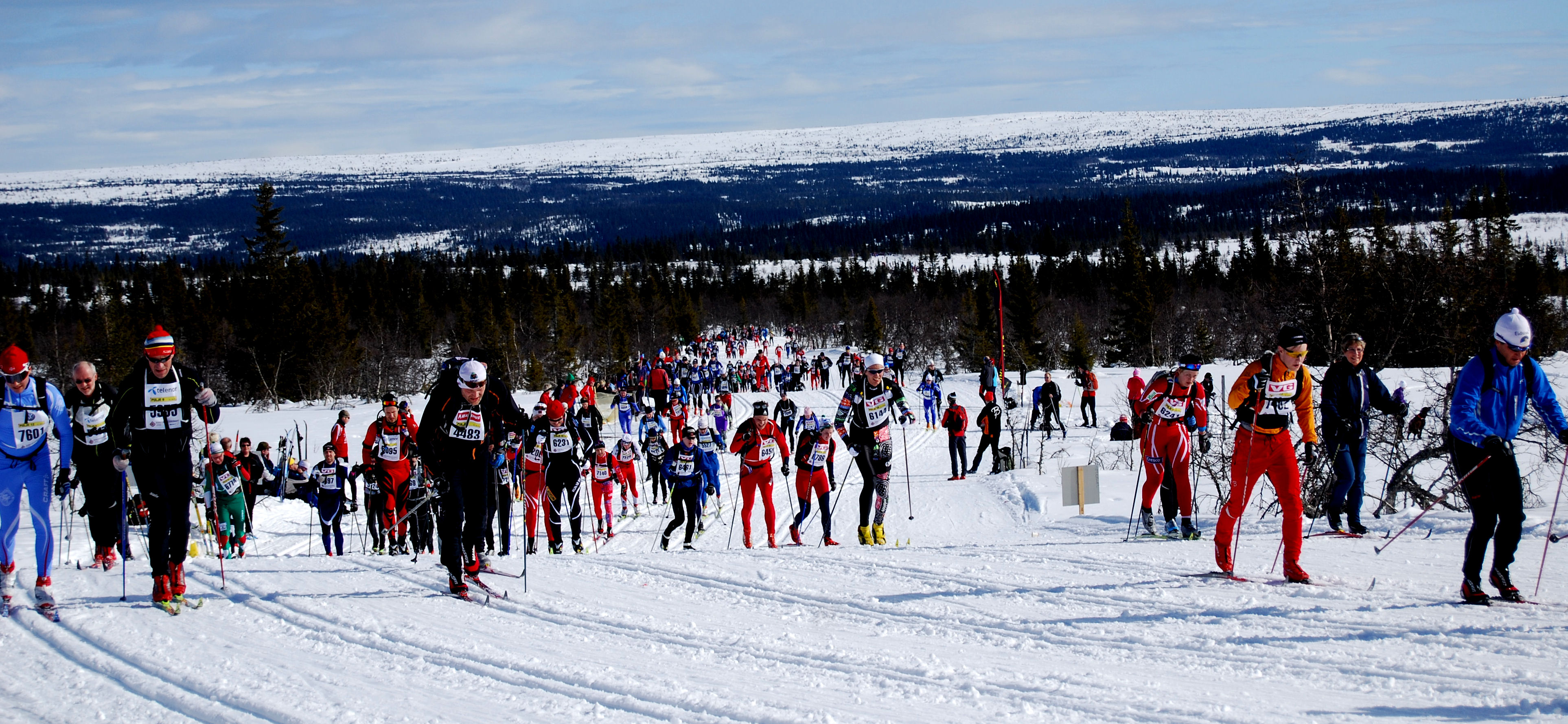 Bildet er tatt 20. mars 2010 ved Midtfjellet ca 30 km ut i løypa, før den kanskje hardeste stigningen.